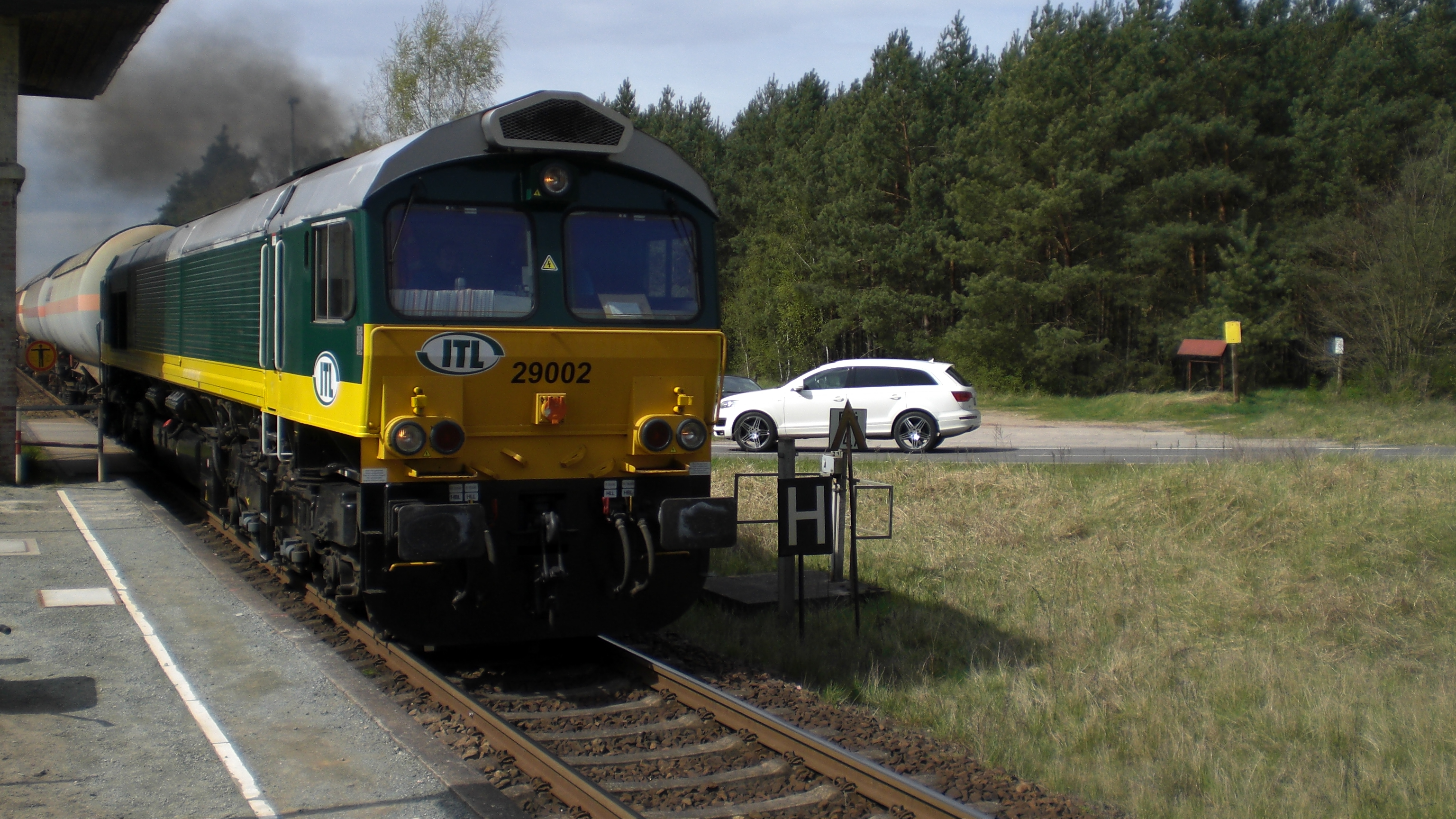 EMD Class 66 in Schönow/Uckermark